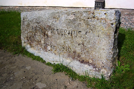 Pater Josephus gravsten framför Indals kyrka.